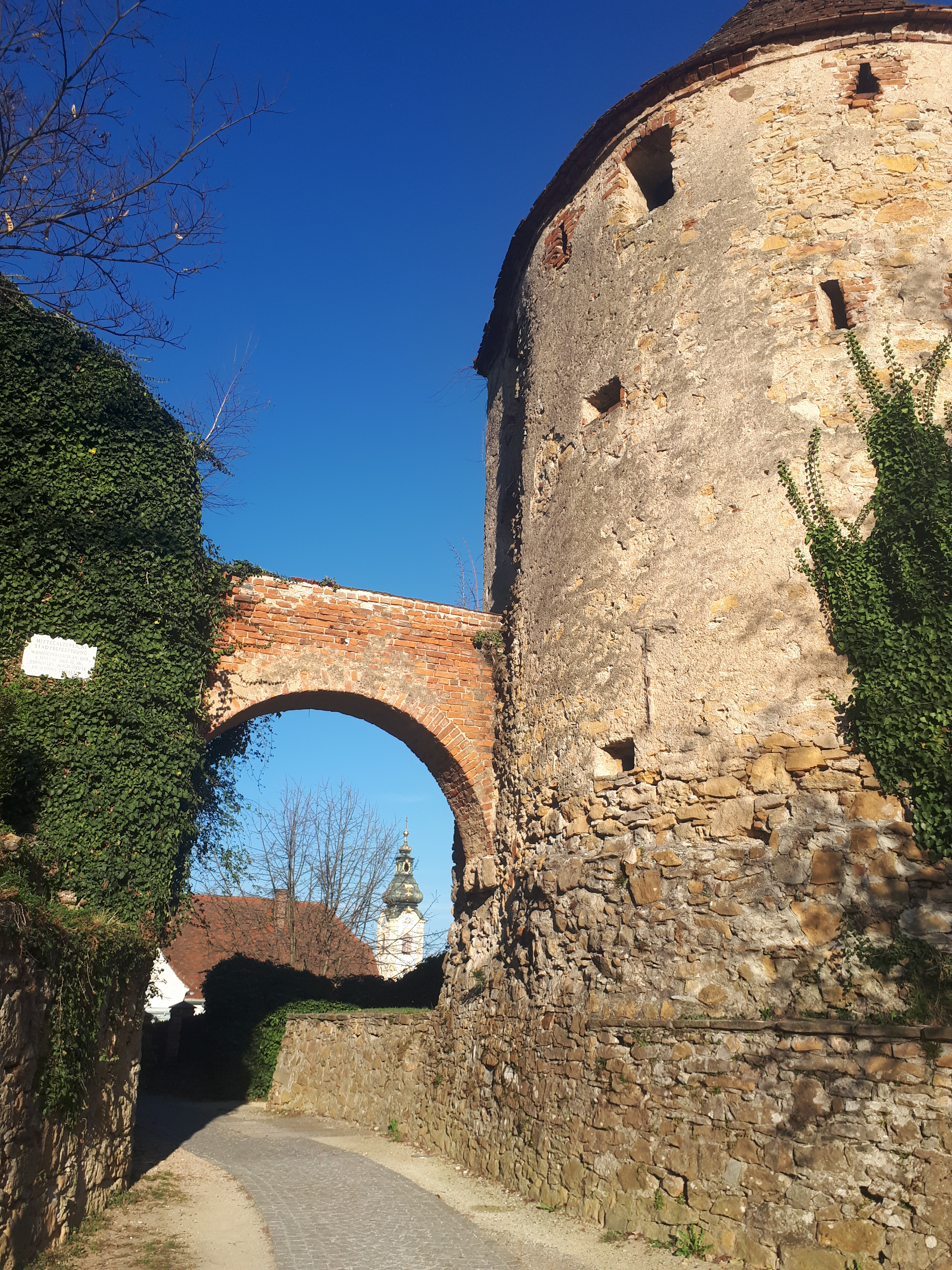 Ruinen der historischen Stadtmauer und Stadttor